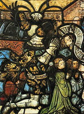 Herzog Ernst der Eiserne mit seinen Söhnen Friedrich, Albrecht und Ernst. Glasmalerei, zwischen 1418 und 1424 (Österreichisches Museum für angewandte Kunst, Wien).